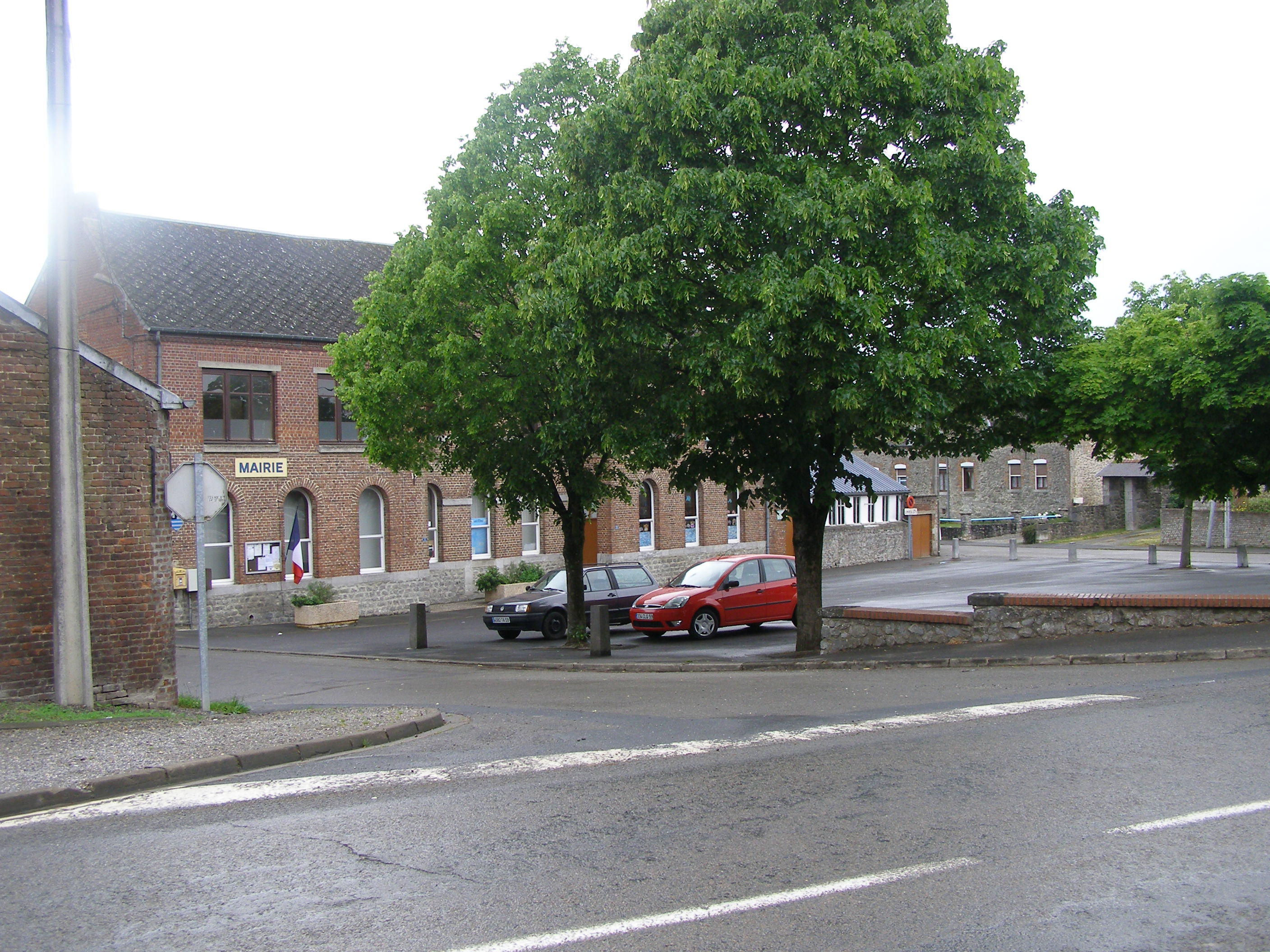 La mairie et la place